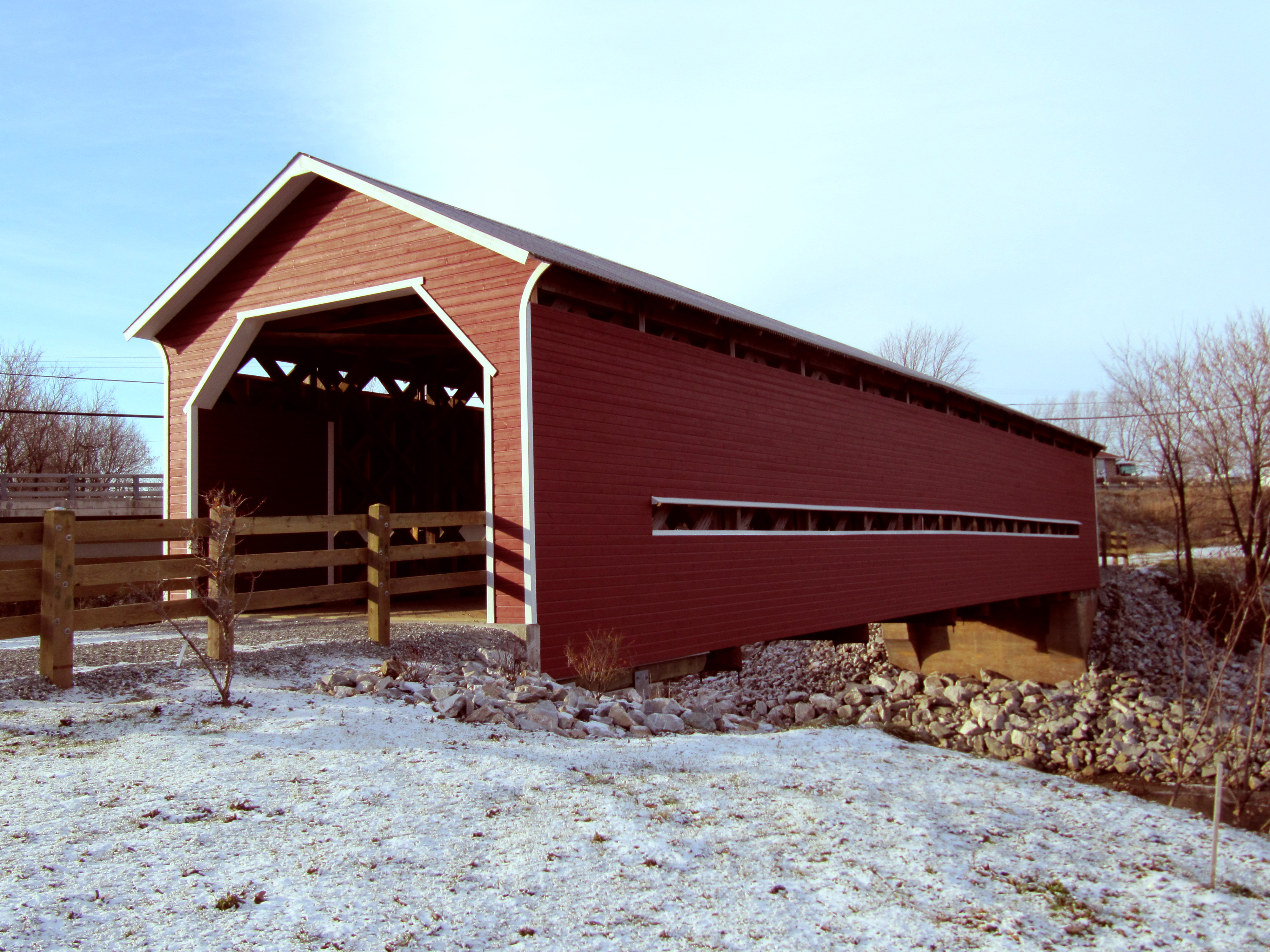 Pont Joseph-Édouard-Perrault après les rénovations de 2011